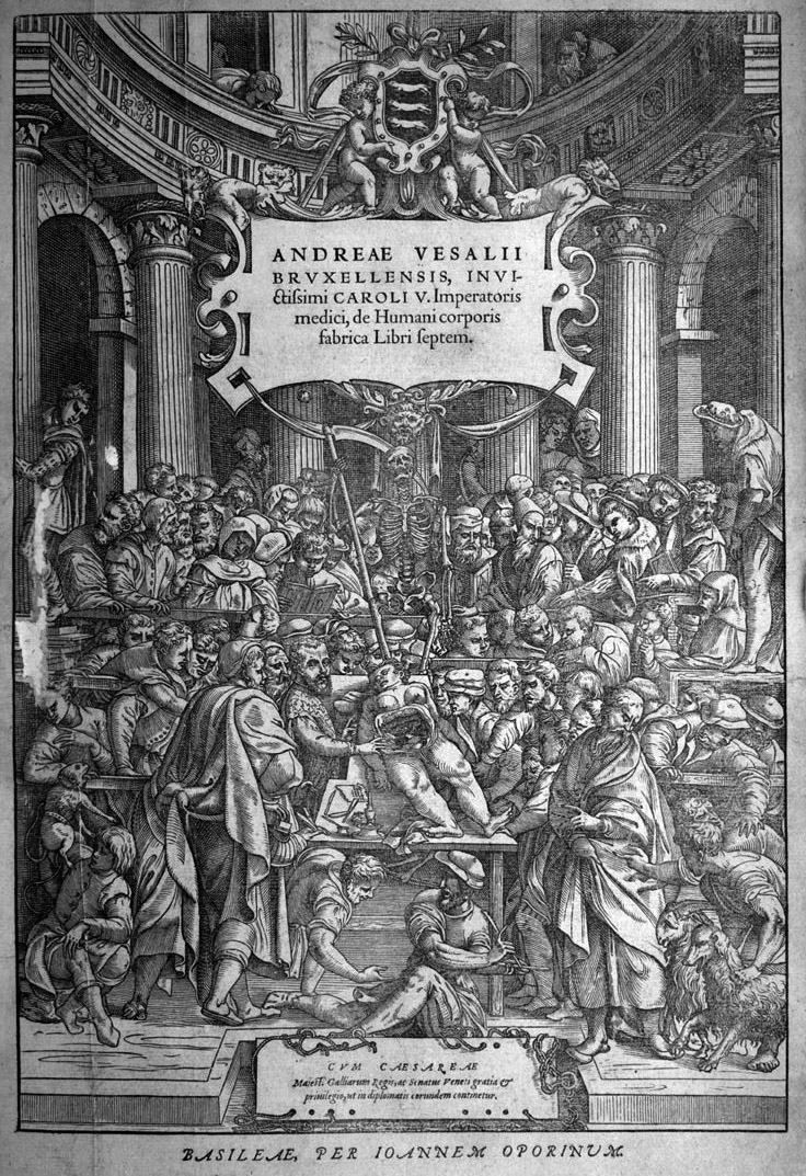 Andreas Vesalius (1514-1564): Andreae Vesalii Bruxellensis, invictissimi Caroli V. Imperatoris medici, de humani corporis fabrica libri septem, 1555.